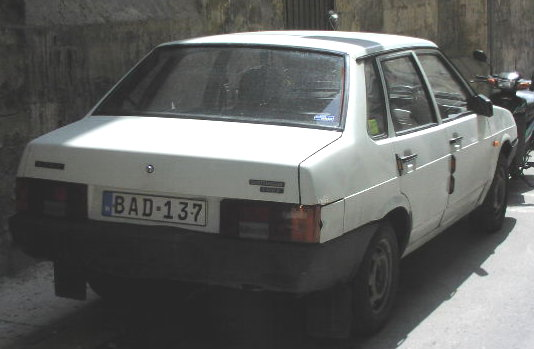 Lada Samara sedan